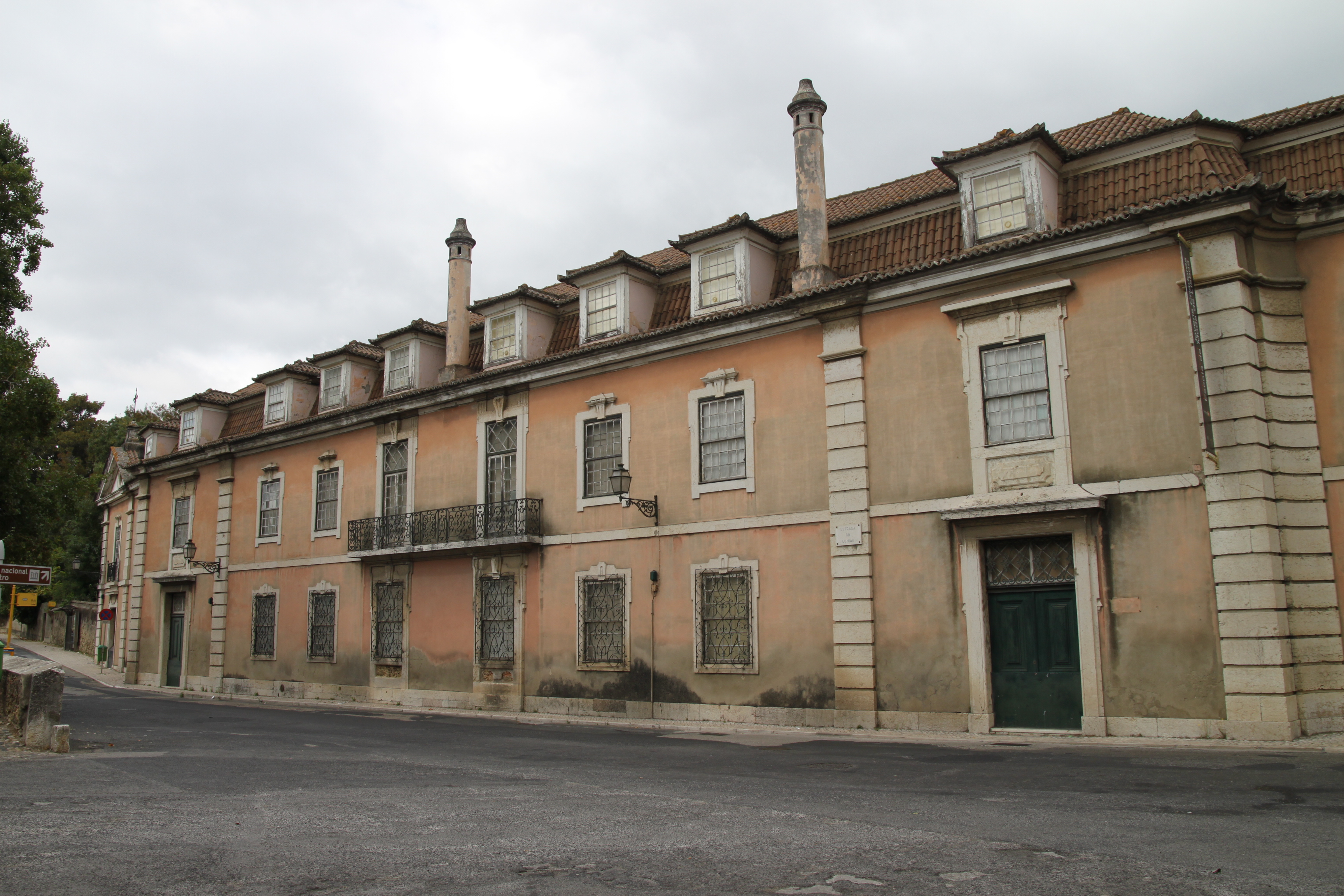 Palácio do Monteiro-Mor This file was uploaded for Wiki Loves Monuments in Portugal with the unique identifier 74720.